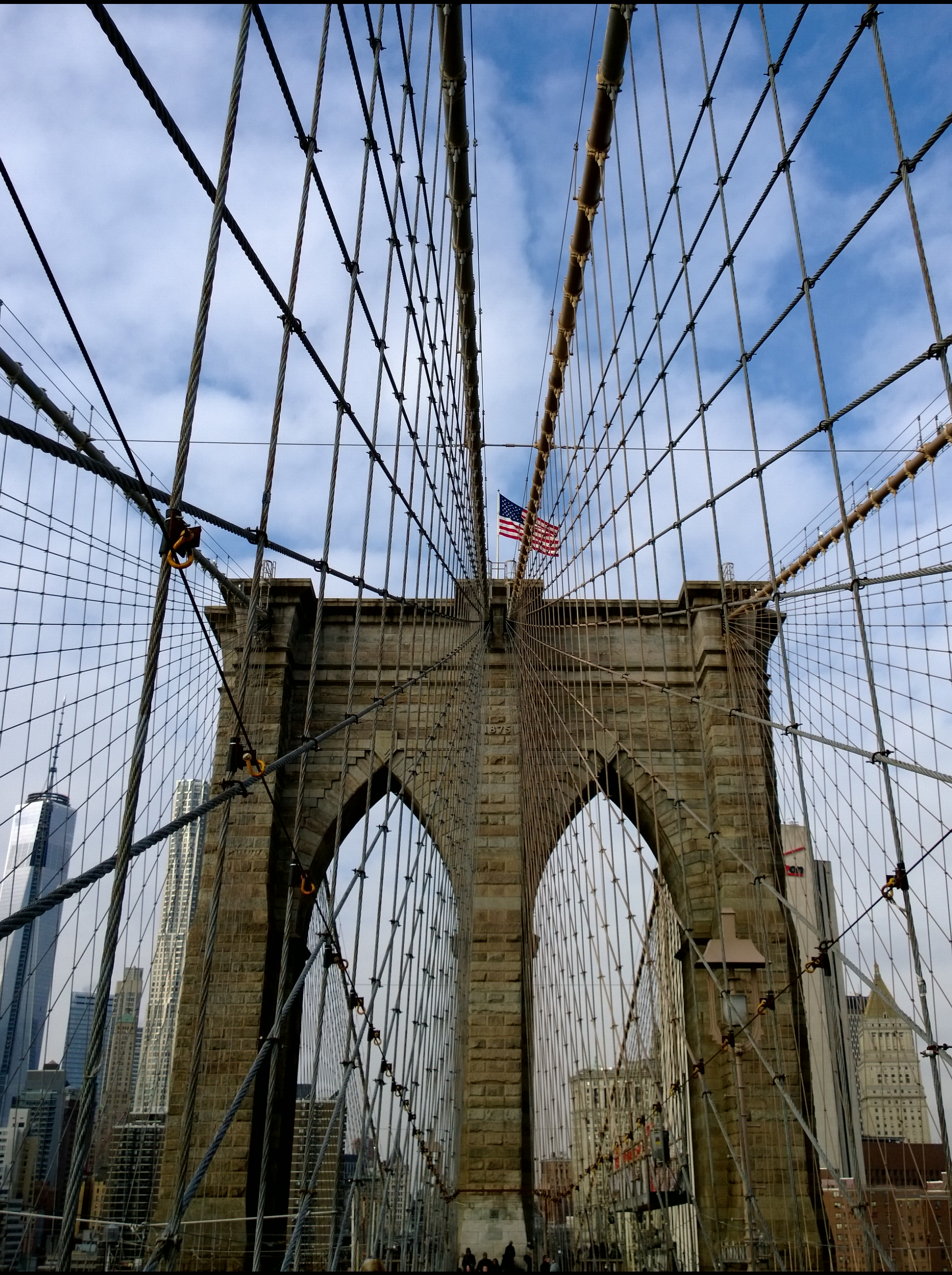 Die Flagge der Vereinigten Staaten auf der Spitze der Brooklyn Brücke.